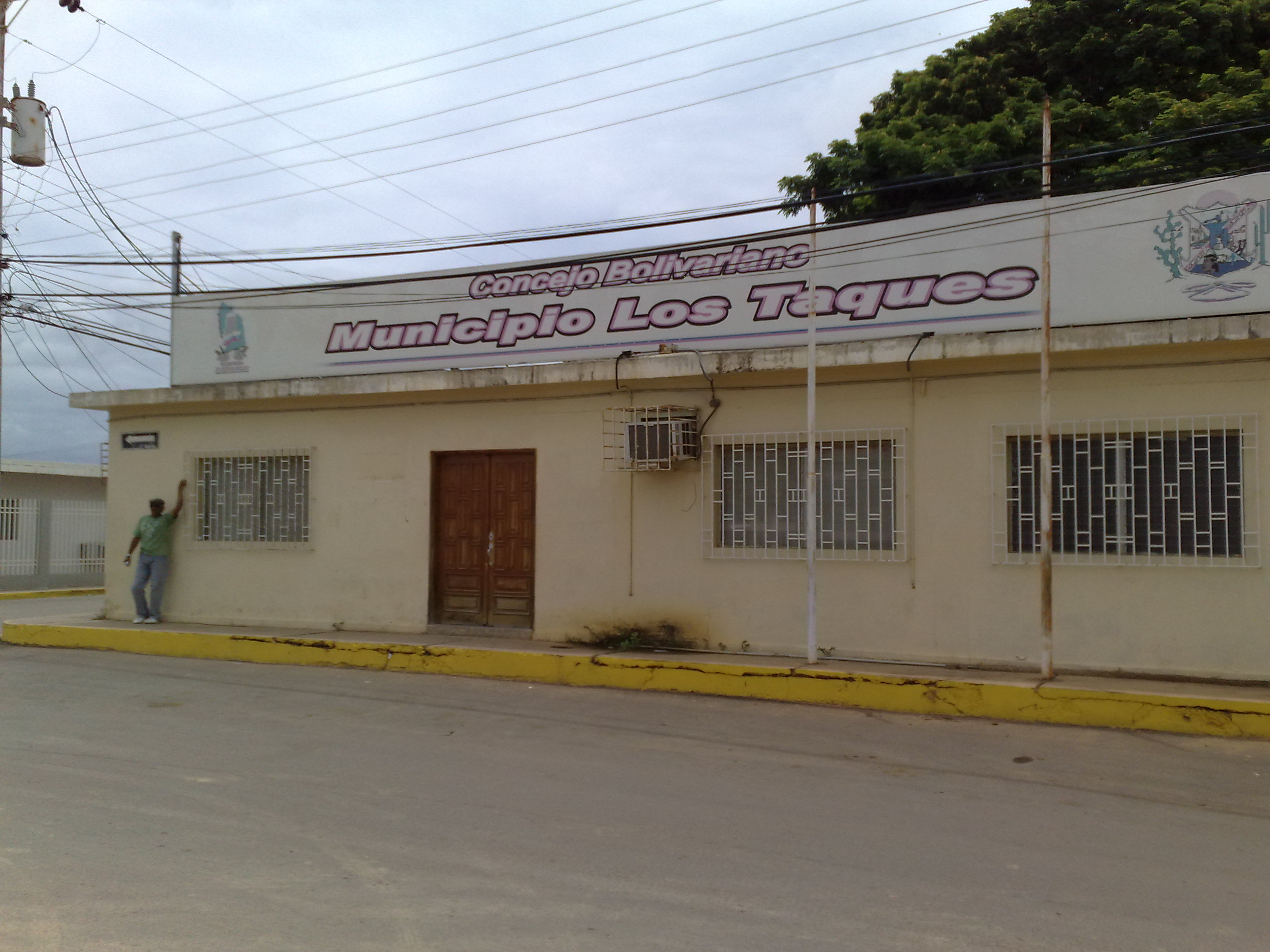 Concejo Municipal del municipio Los Taques, en Santa Cruz de Los Taques, anteriormente sede de la alcaldía del municipio.